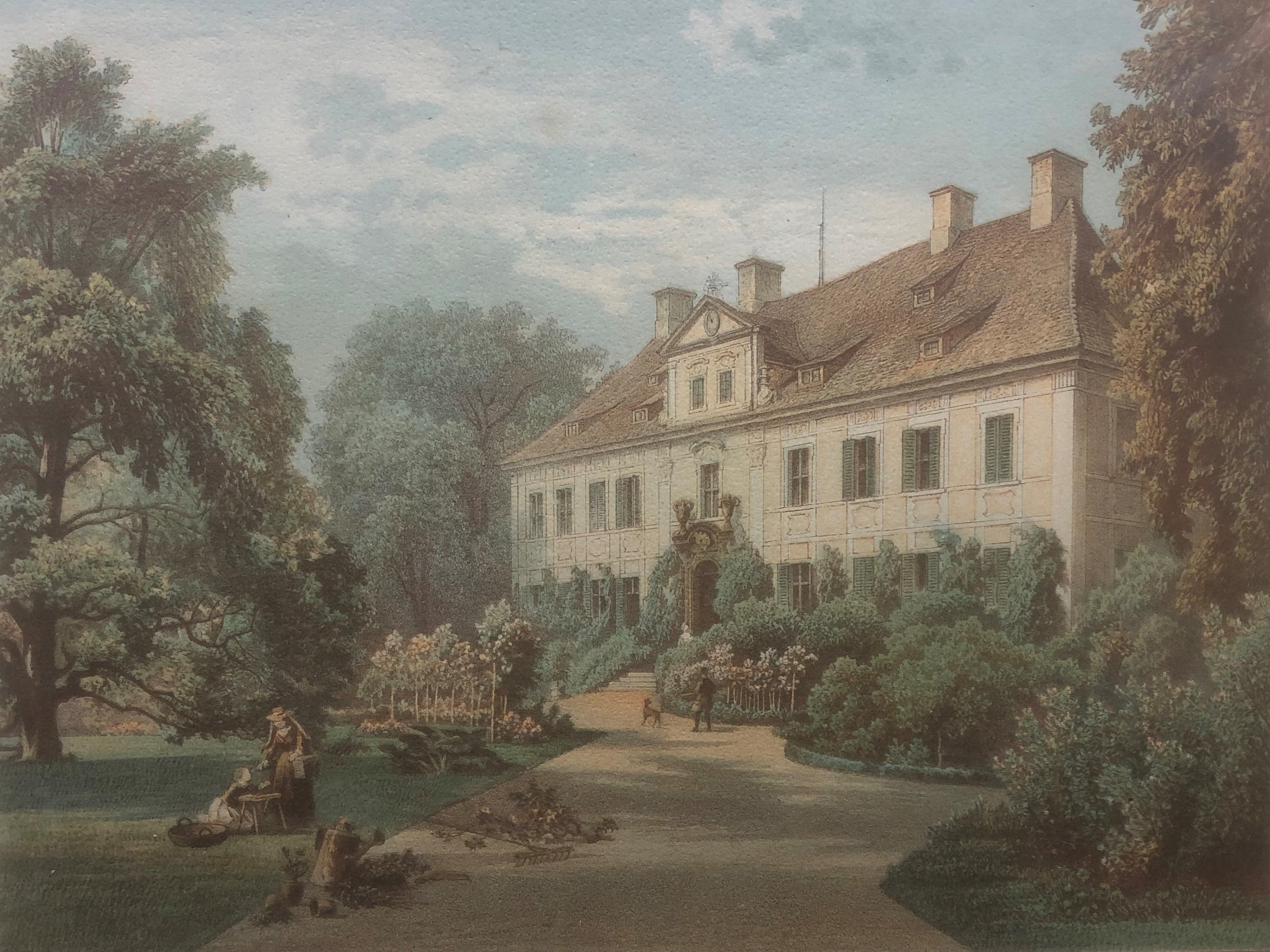 Herrenhaus Pohlschildern Provinz Schlesien, Regierungs-Bezirk Liegnitz, Kreis Liegnitz